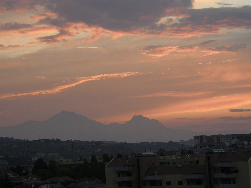 Pescara.